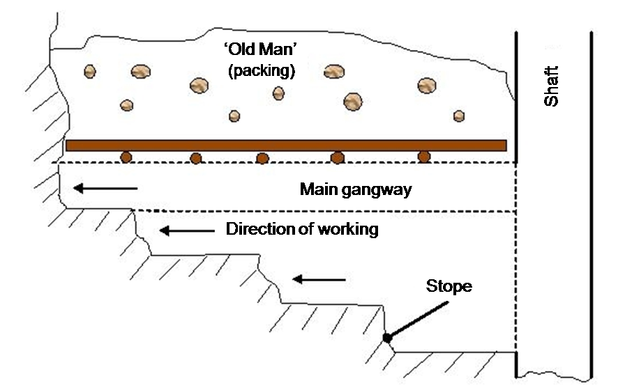 Skizze Strossenbau